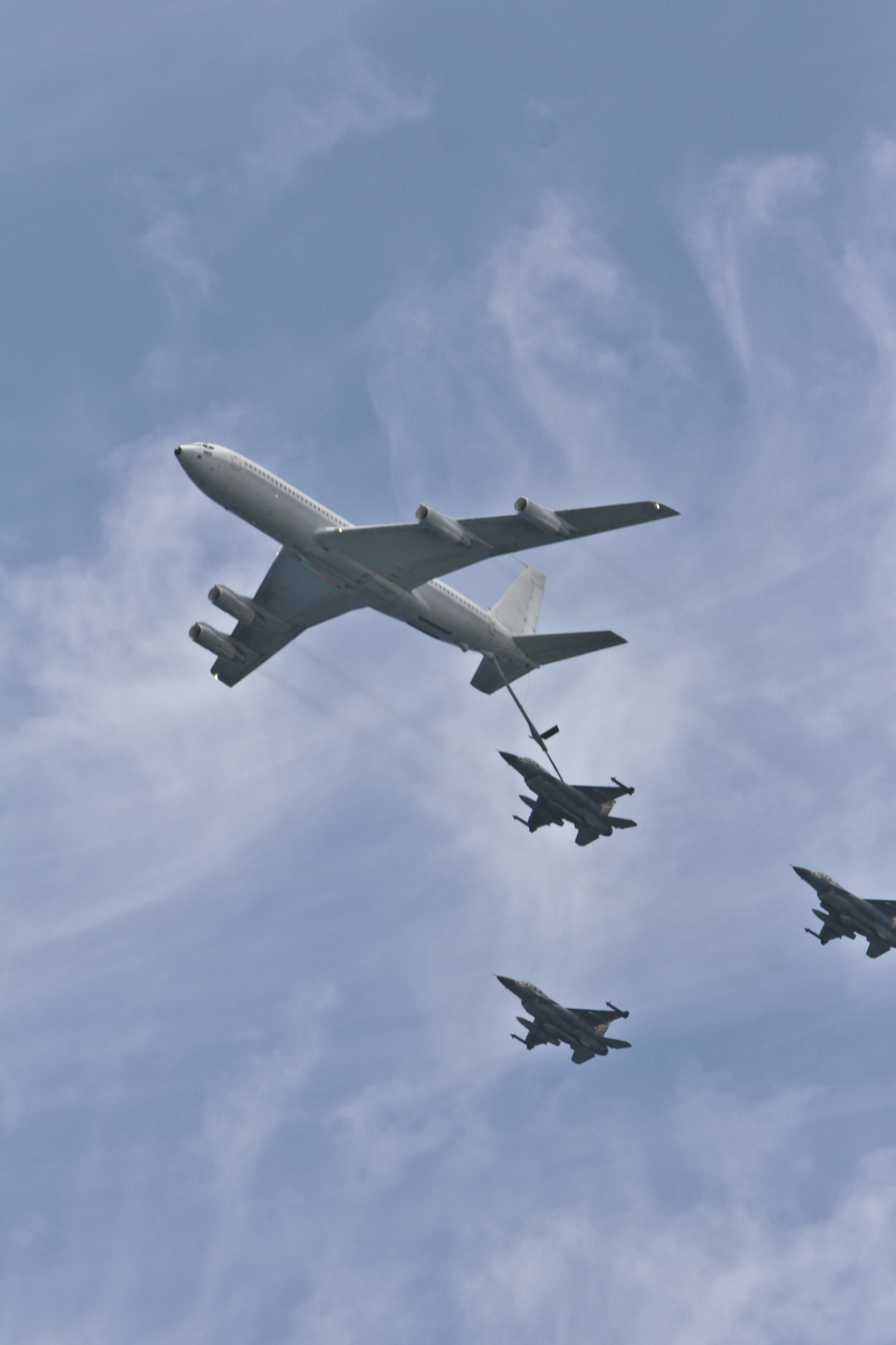 מפגן חיל האוויר יום העצמאות ה-60 למדינת ישראל